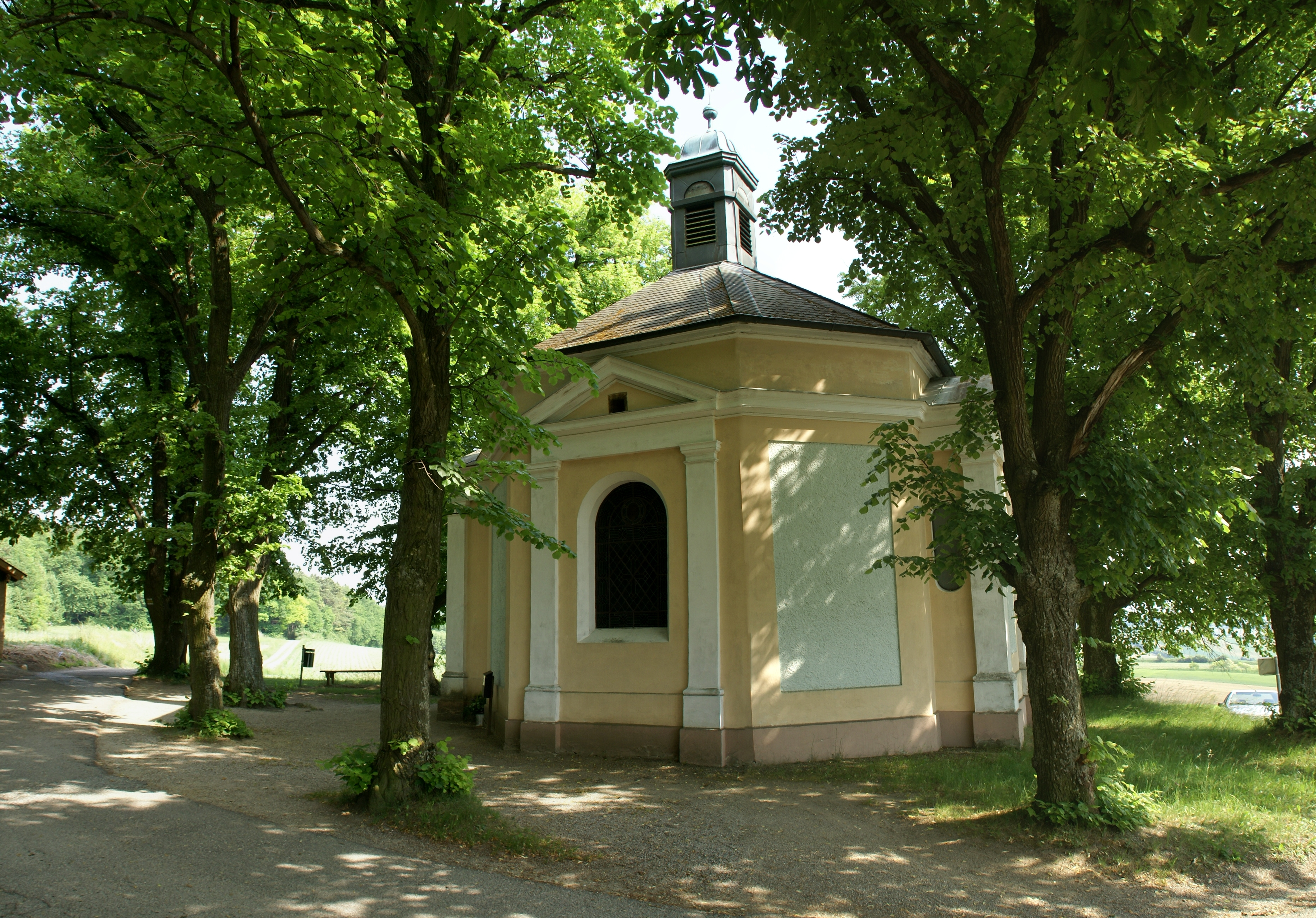 Marienkapelle in Maria Ellend bei Kuffern, Pfarre und Gemeinde Statzendorf, Bezirk Sankt Pölten-Land, Niederösterreich